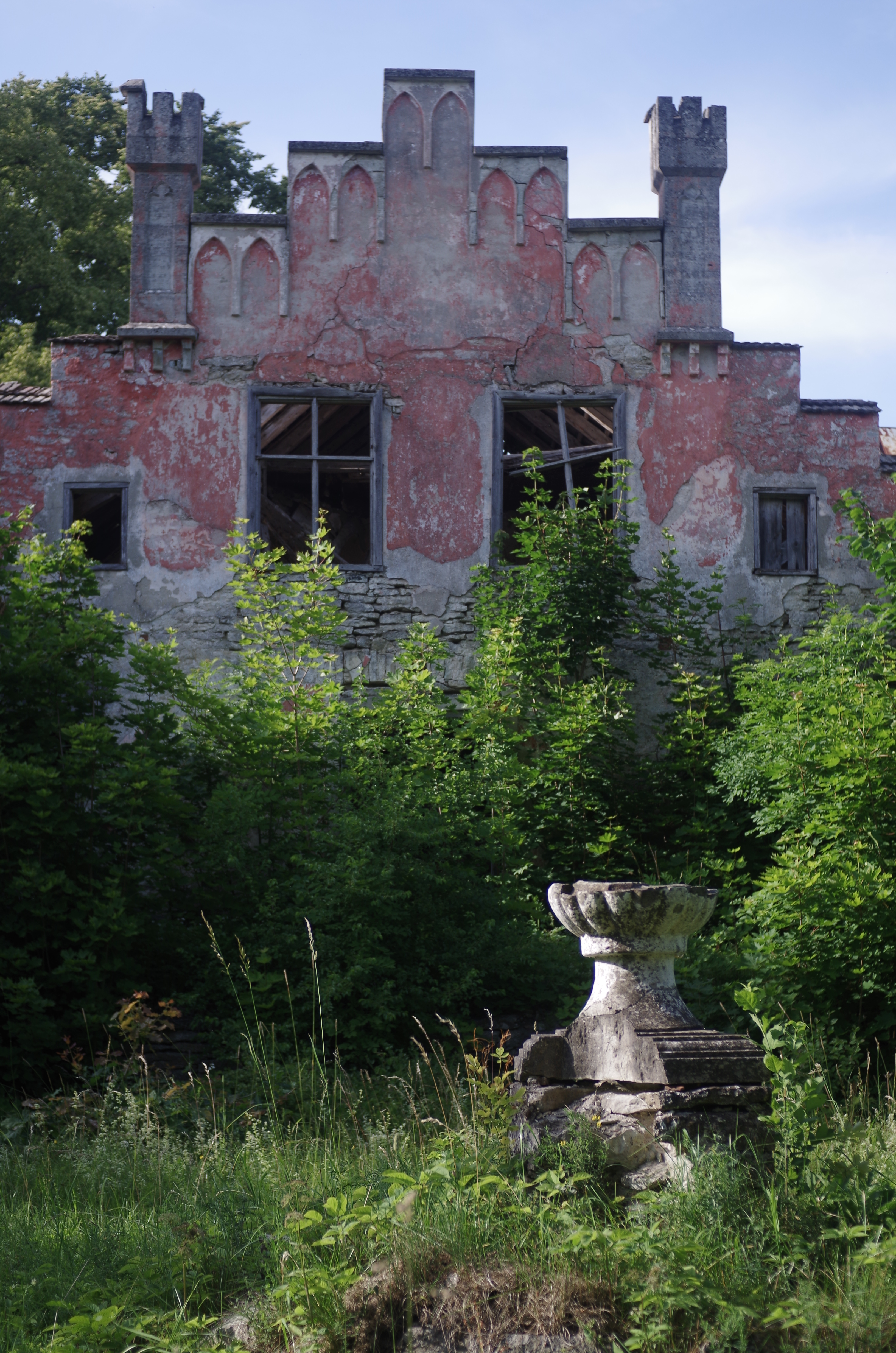 Pihtla mõis Saaremaal Pihtla vallas. (Foto: 2014)